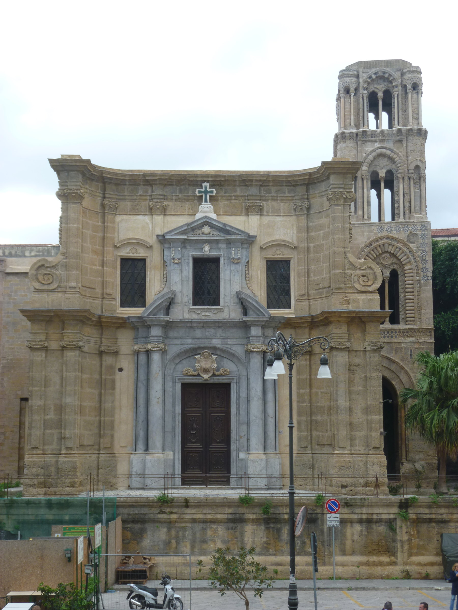 Palermo